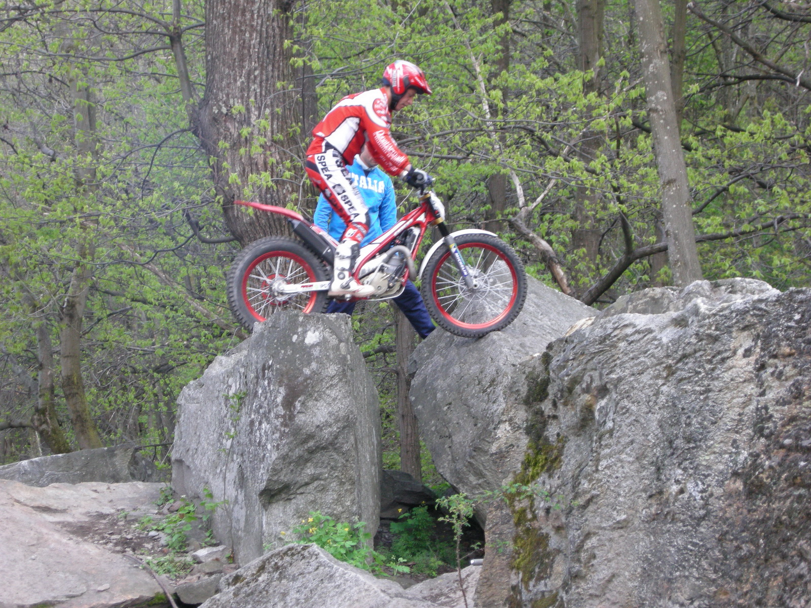 Gara di Trial in moto disputatasi il primo di maggio vicino al nostro bed and breakfast, frazione Castel del Bosco (Val Chisone, Roure-TO)